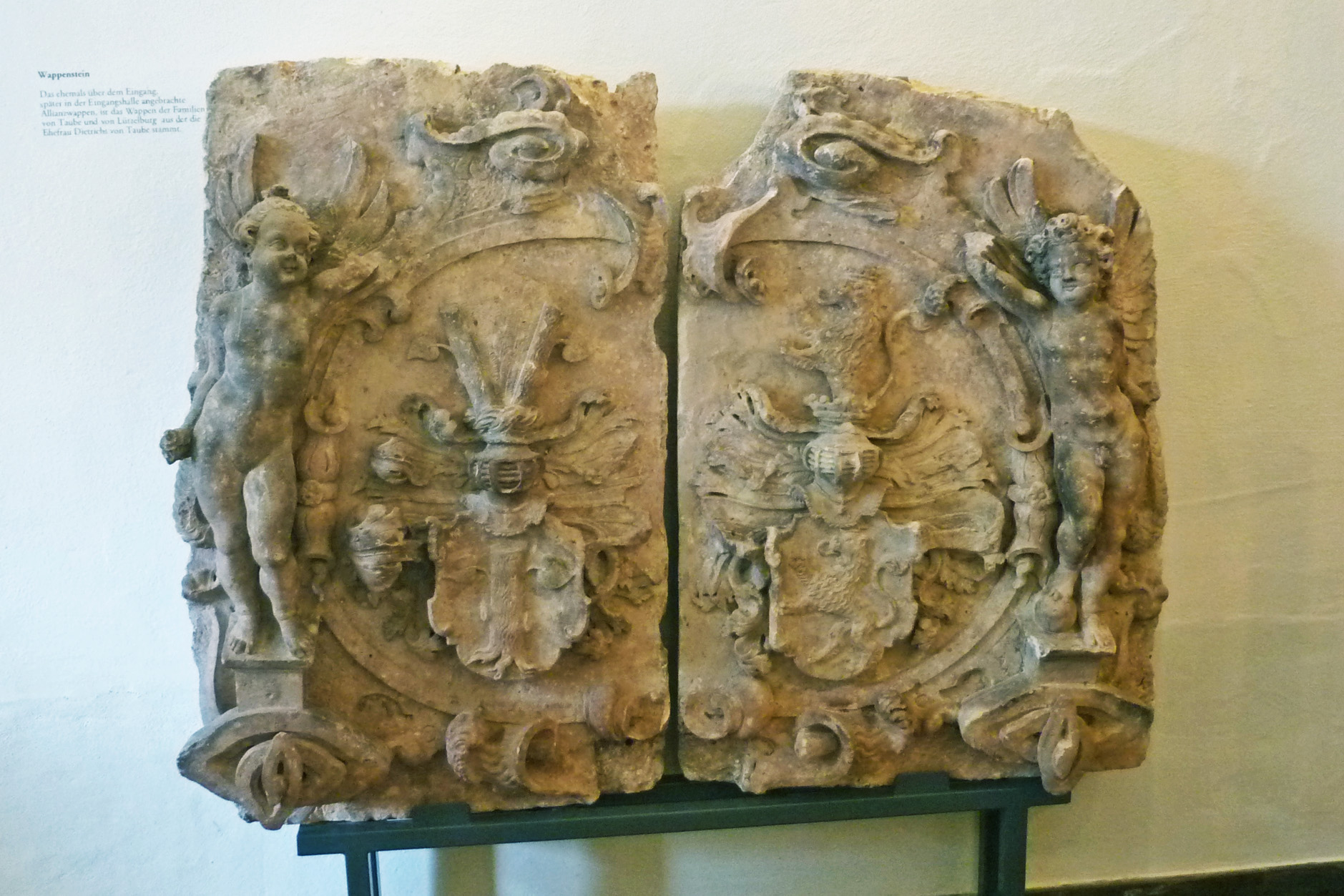 Wappen der Fam. von Taube im Wasserschloss Klaffenbach bei Chemnitz